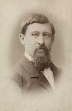 Portrett av Peder Cappelen Thurmann. Eier: Oslo museum